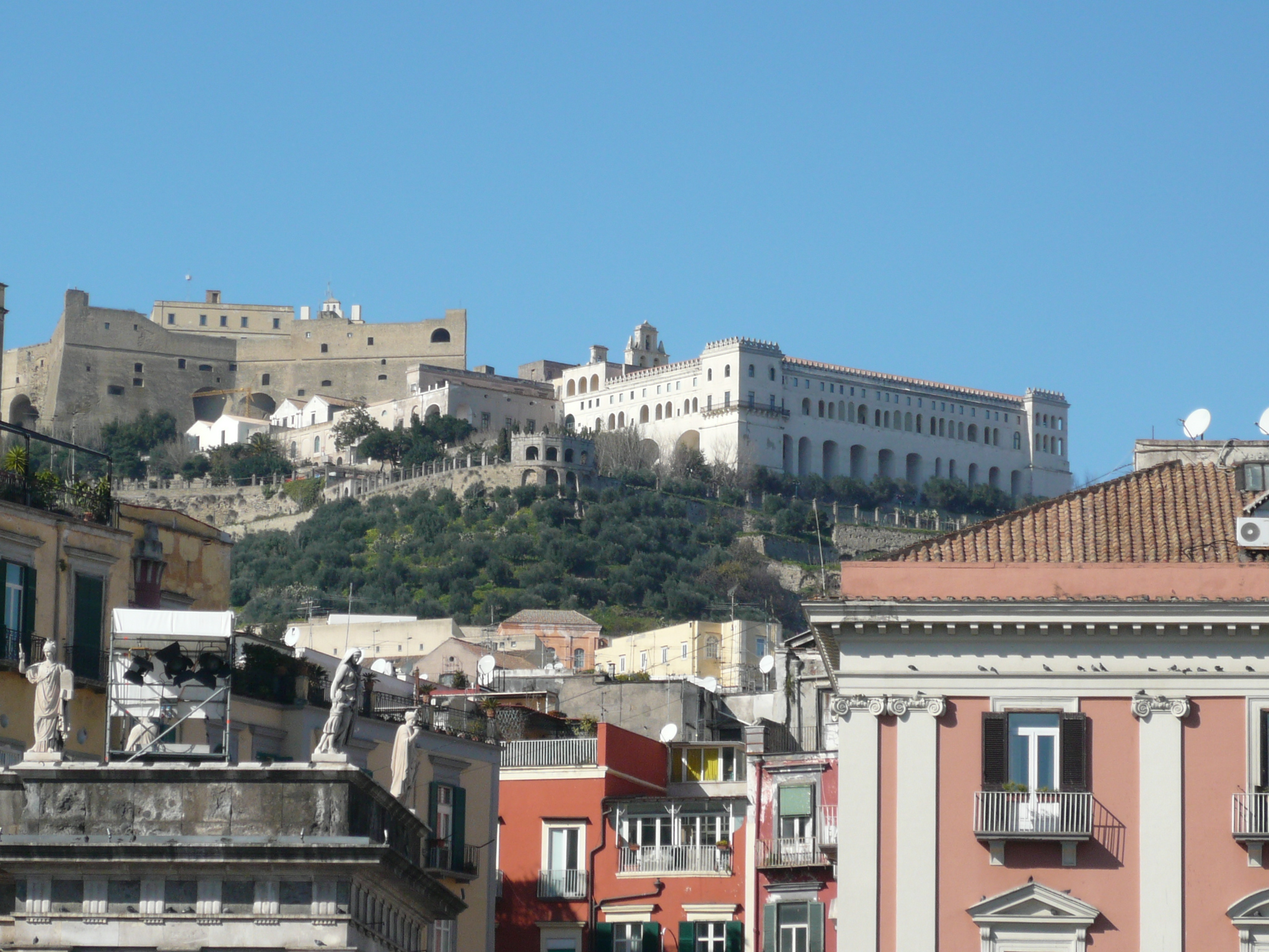 Castel Sant' Elmo visto da piazza del Plebiscito. Accanto al Castello la Certosa di San Martino Autore foto: Roberto De Martino